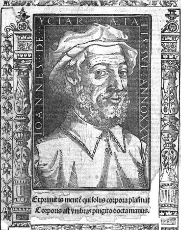 Juan de Ycíar (o de Iciar), también conocido con el sobrenombre de El vizcaíno, (Durango, Señorío de Vizcaya, Corona de Castilla -actualmente, provincia de Vizcaya, País Vasco, España- c. 1523 - ¿Logroño, Corona de Castilla? después de 1572), fue un calígrafo español del siglo XVI.